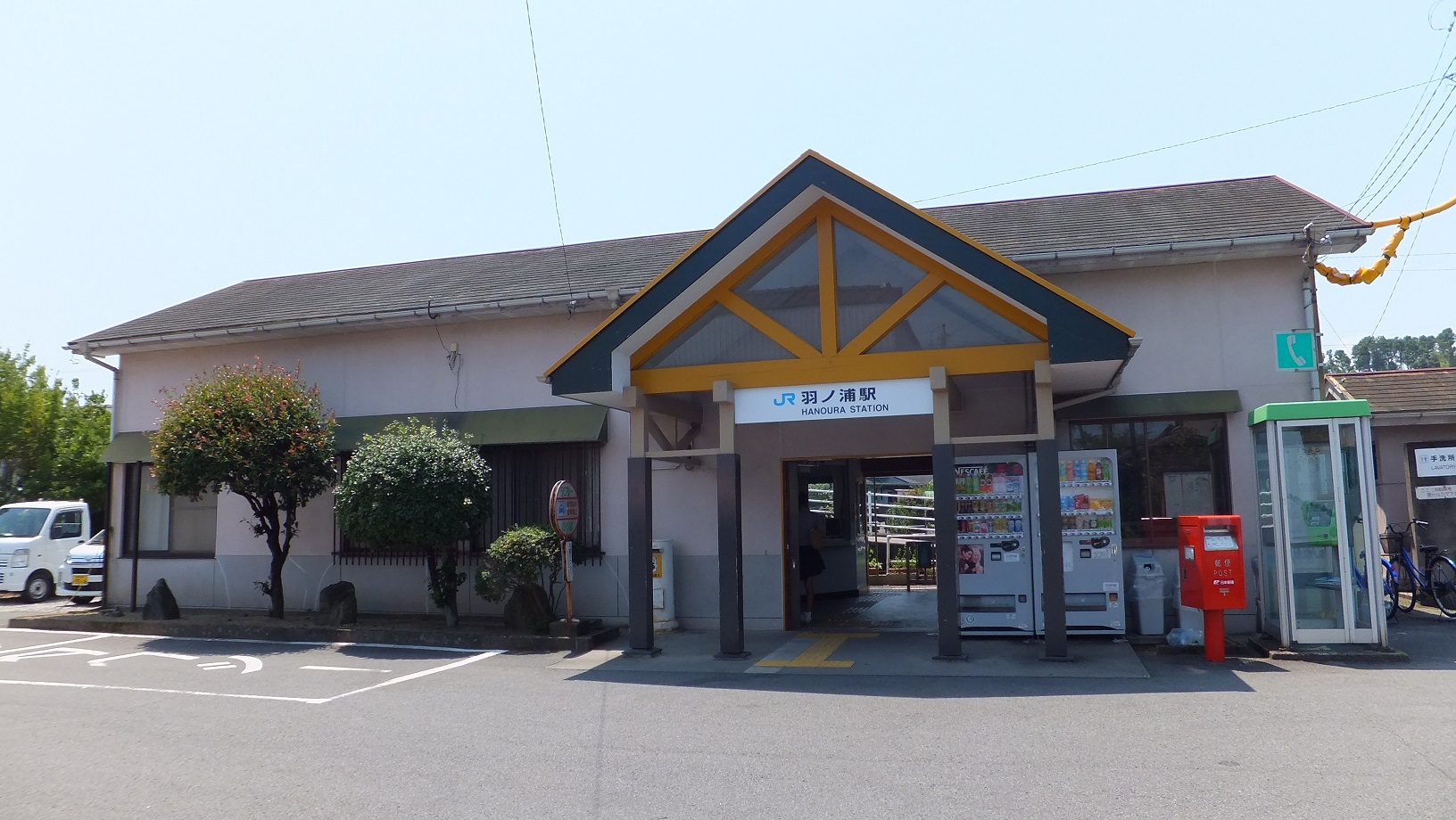 JR牟岐線 羽ノ浦駅（徳島県阿南市羽ノ浦町）